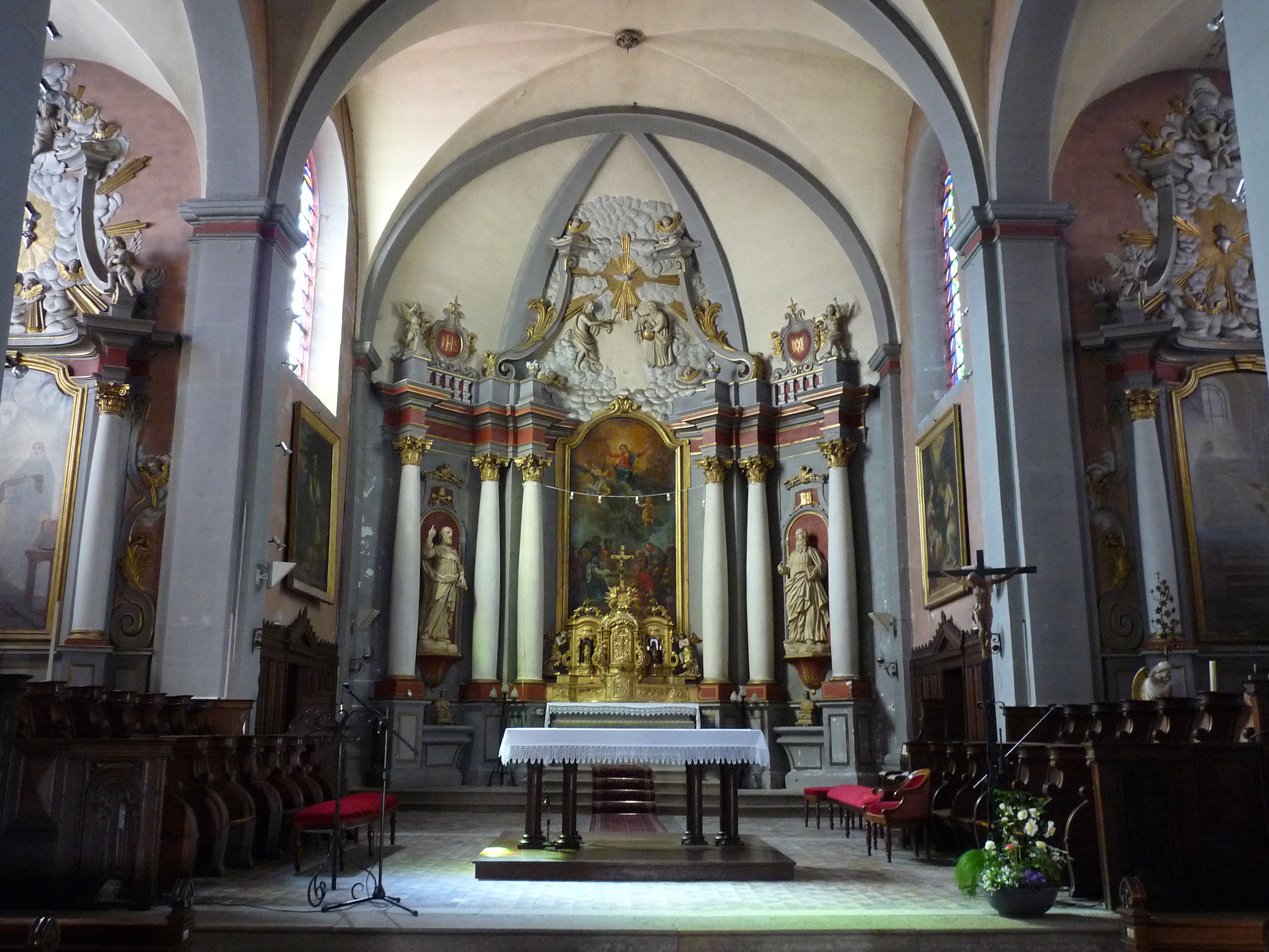 Intérieur de l'église de l'Assomption de Mouthe (Doubs)